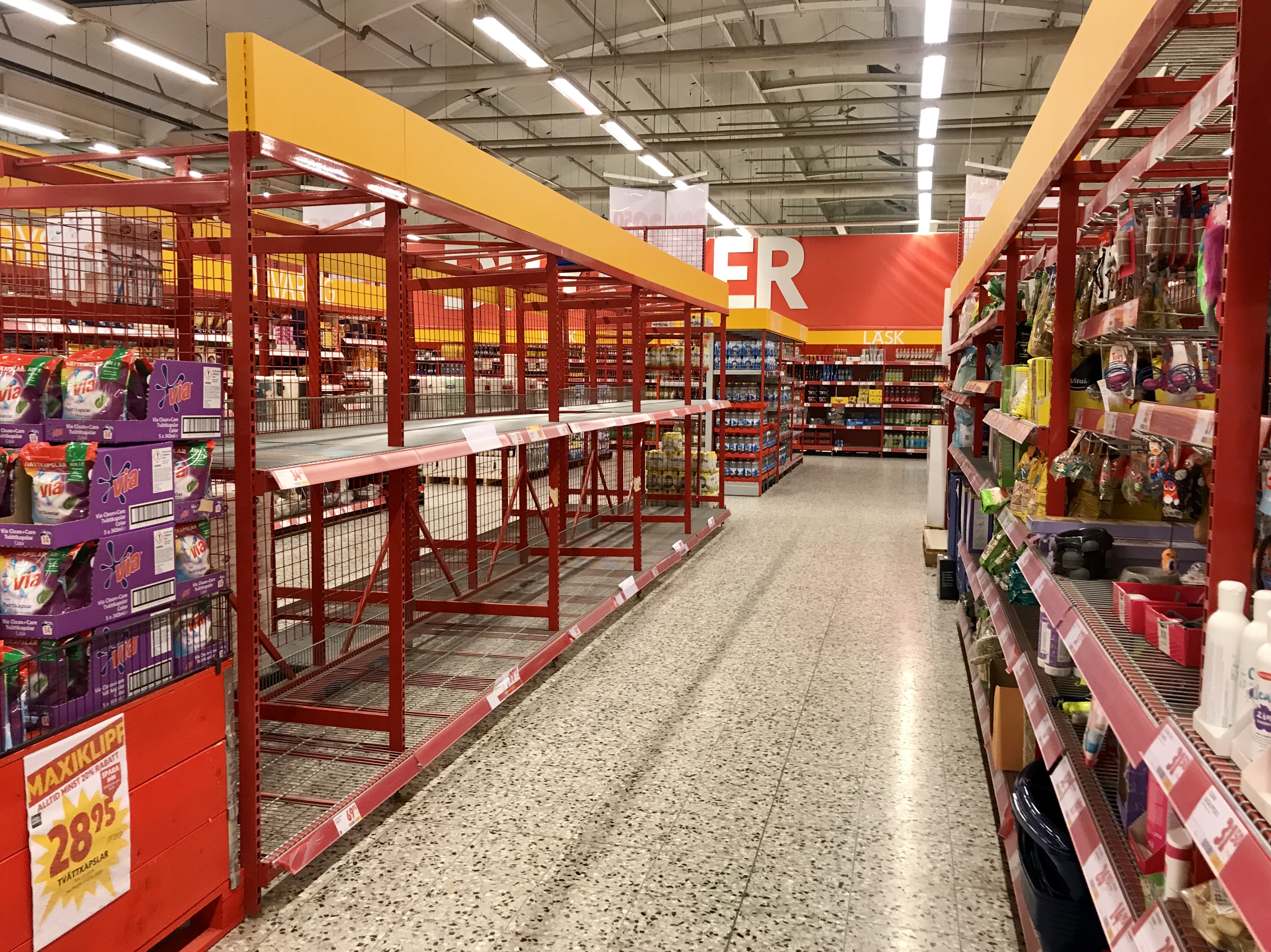 Tomma butikshyllor, på ICA Maxi Stormarknad vid Grafiska vägen 16 i stadsdelen Krokslätt i Göteborg, pga (onödig) hamstring av toapapper under coronakrisen.